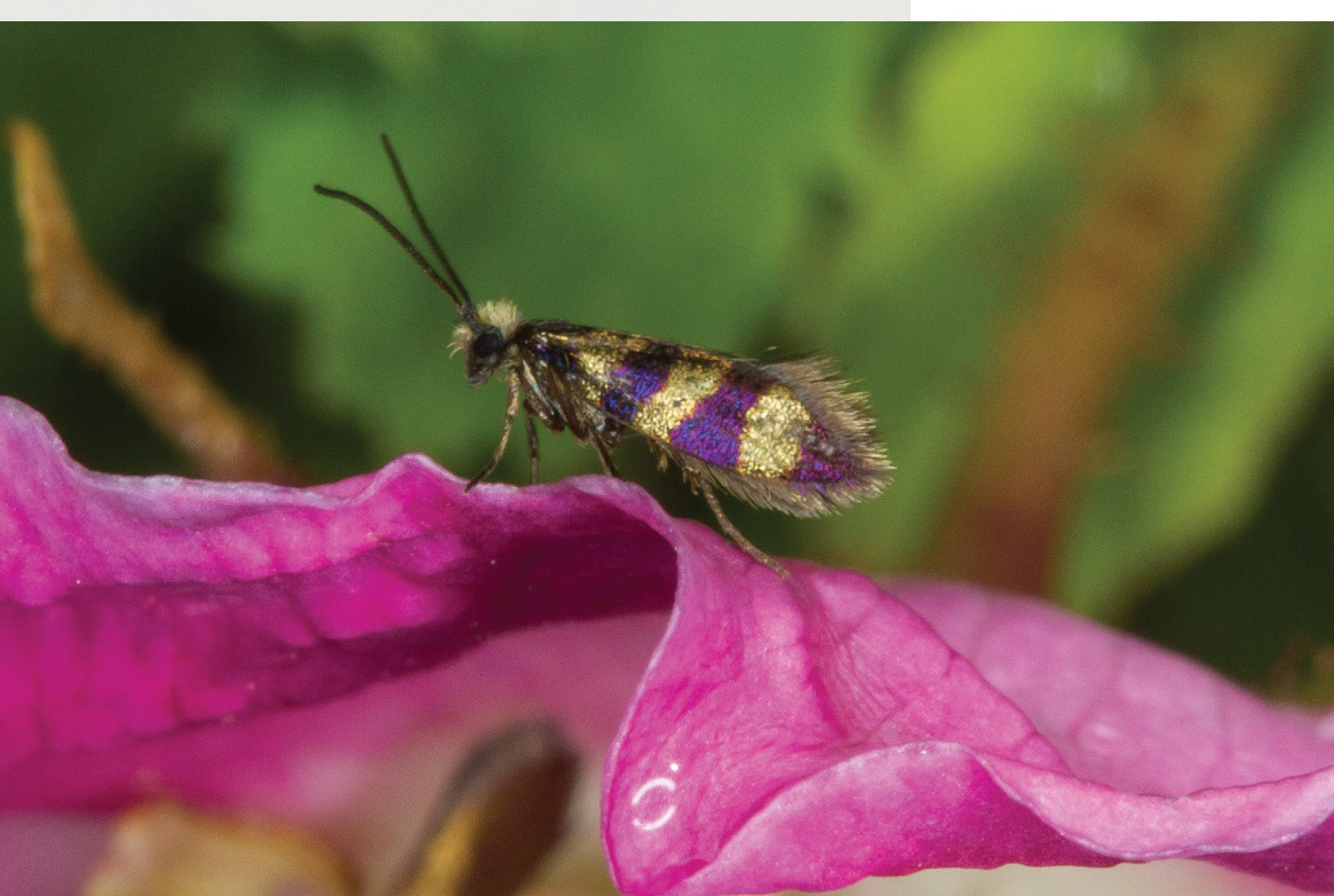 Micropterix gaudiella